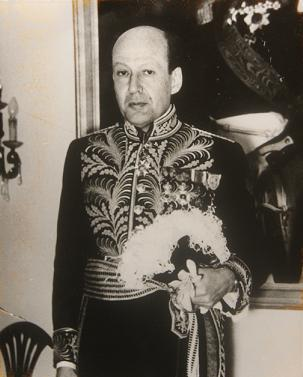 Antoine Nicolas Beyens (Paris, 6 oktober 1906 - Bruxelles, 15 december 1995), Ambassadeur de Belgique.